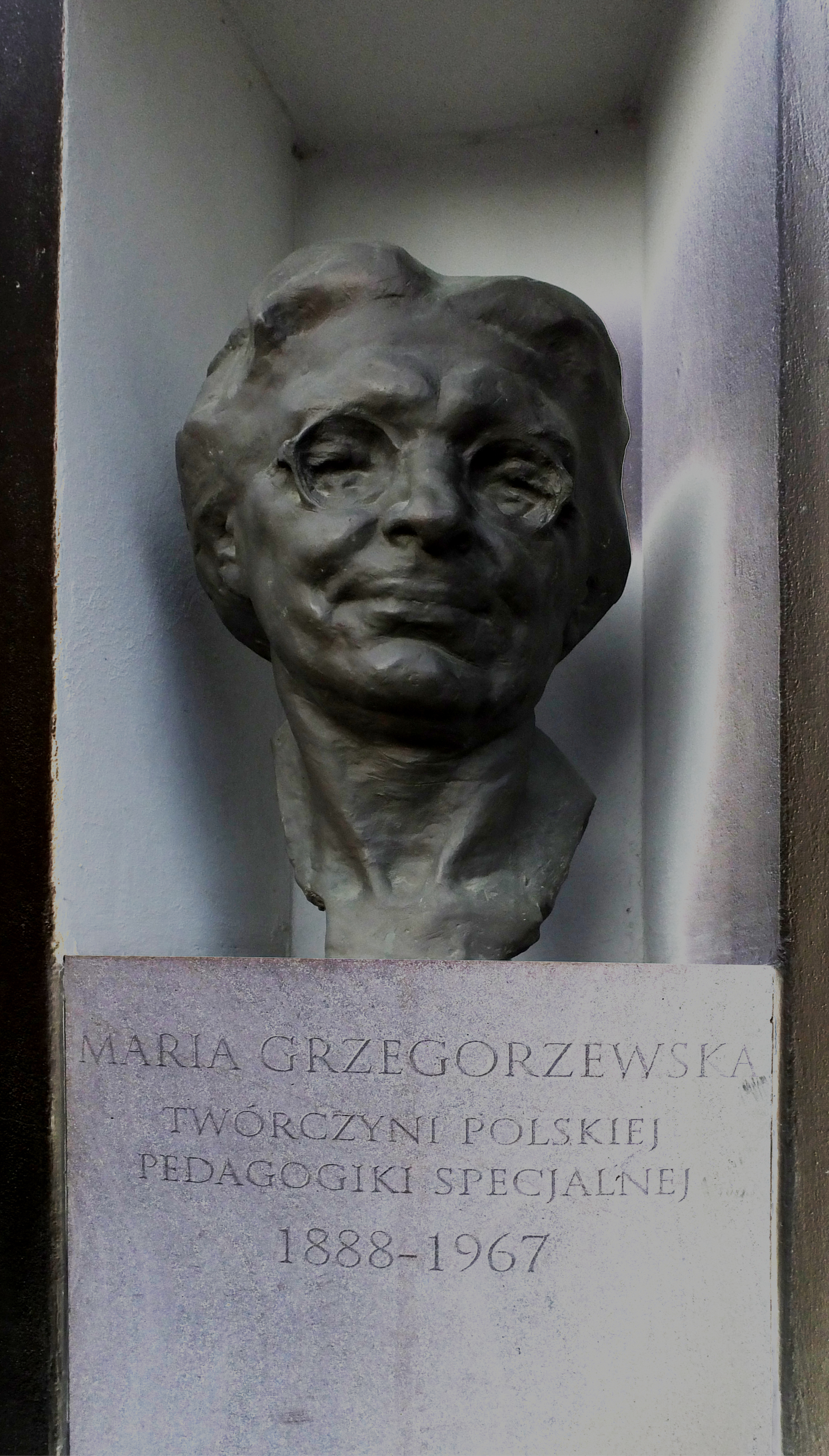 Dom na ulicy Spiskiej w Warszawie 16 w Warszawie, współcześnie jeden z budynków Akademii Pedagogiki Specjalnej. Popiersie patronki uczelni w niszy w ścianie.